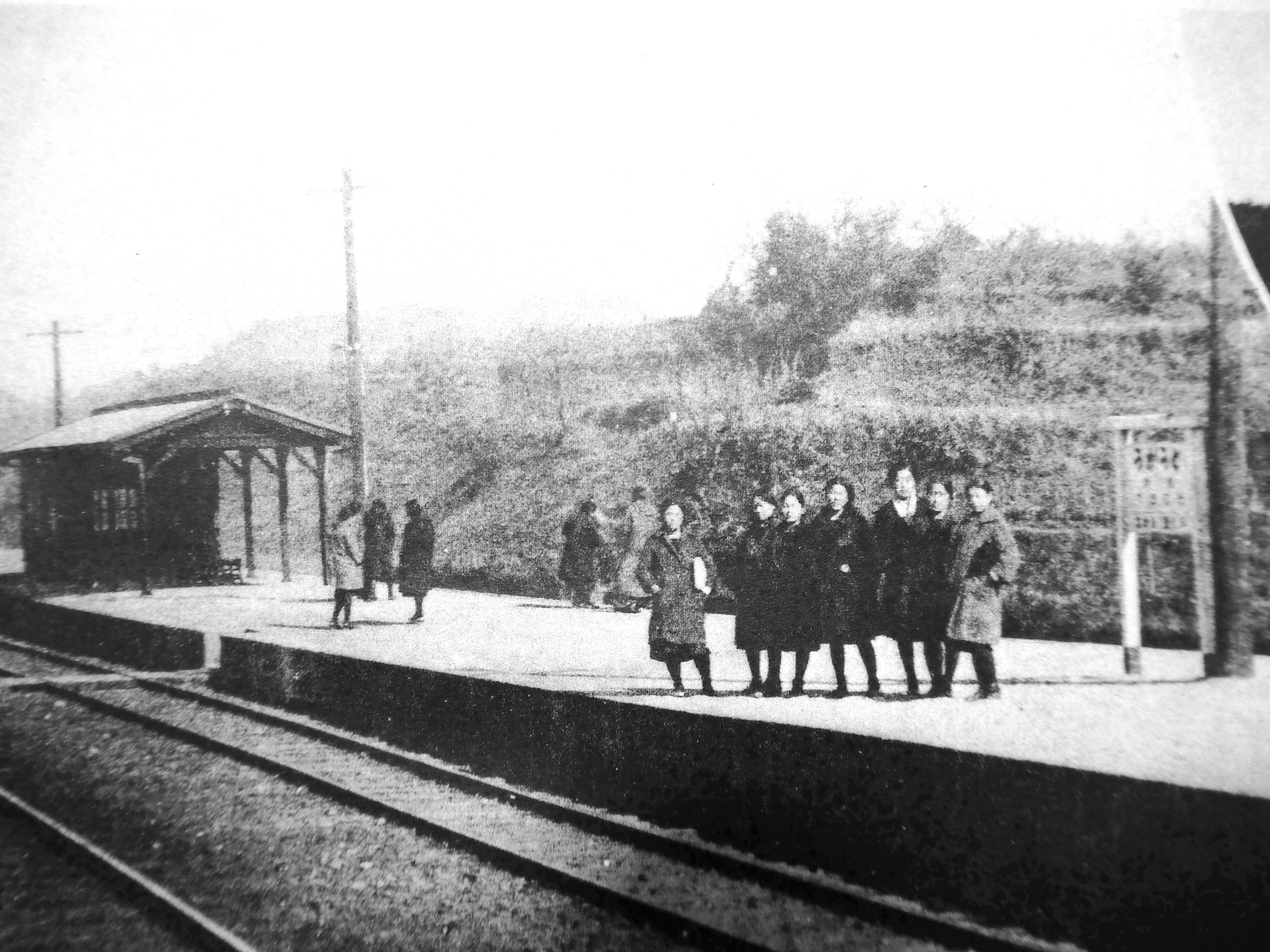 東郷駅で汽車を待つ、宗像高等女学校の生徒たち。彼女らの後ろの丘は、現在日の里団地になっている。